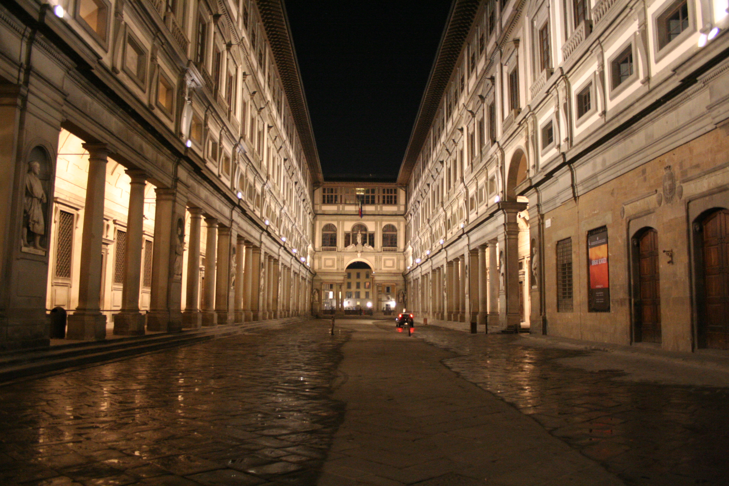 galleria degli uffizzi (DC)